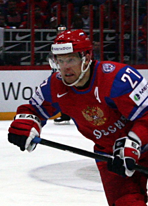 Алексей Терещенко. ЧМ 2012, Полуфинал, 19.05.2012, Финляндия-Россия, Хельсинки.